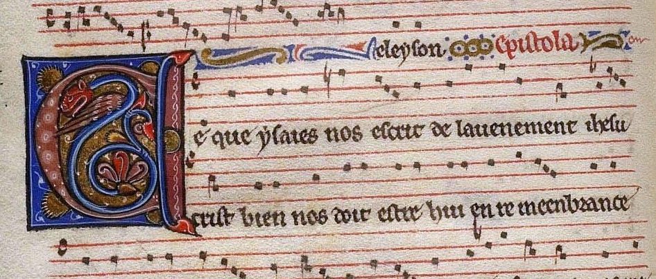 f46v Épître farcie de l'Epiphanie